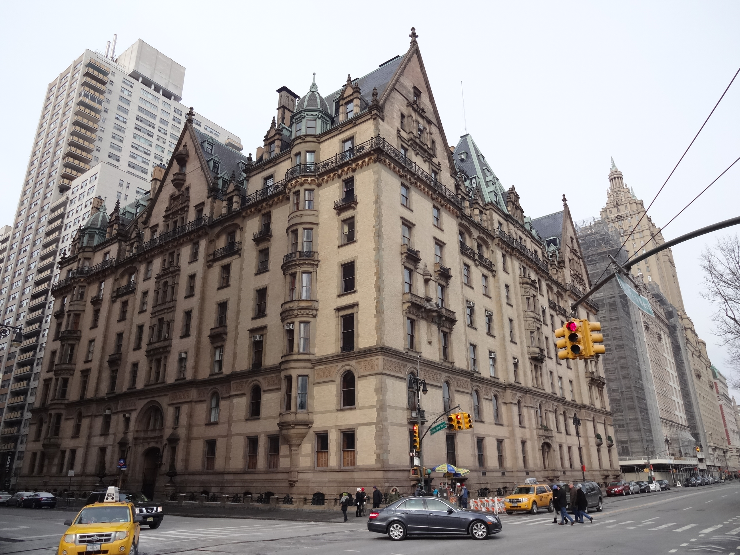 Edifício Dakota.